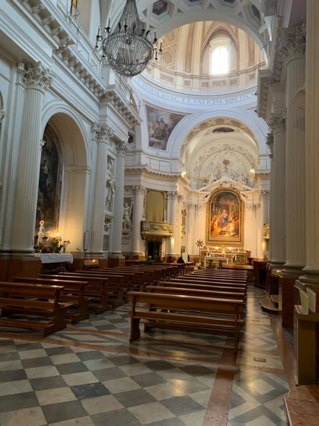 Veduta della navata della chiesa settecentesca del Santissimo Sacramento.